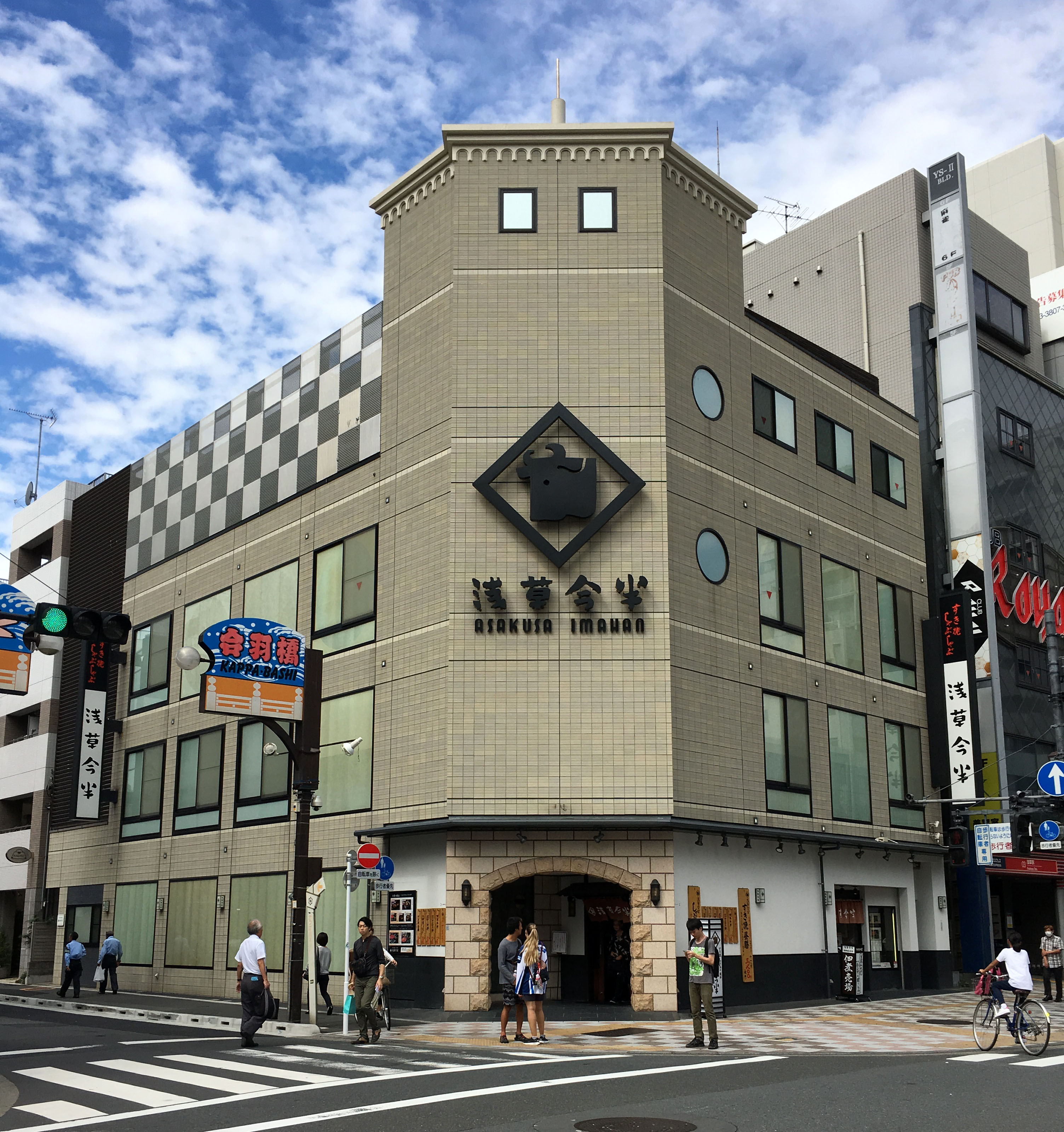 浅草今半 国際通り 本店